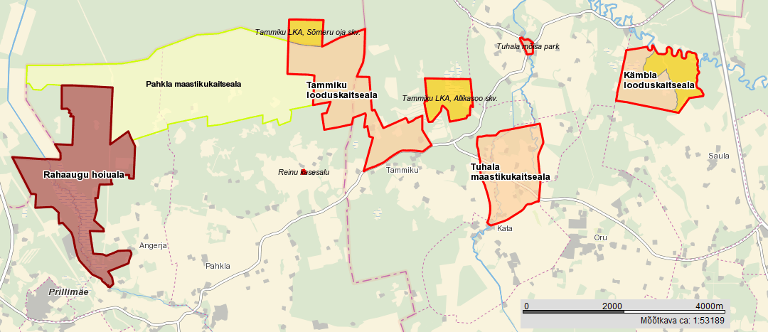 Tammiku LKA, Kämbla LKA, Tuhala MKA, Pahkla MKA ja Rahaaugu hoiuala Maa-ameti kaardil.